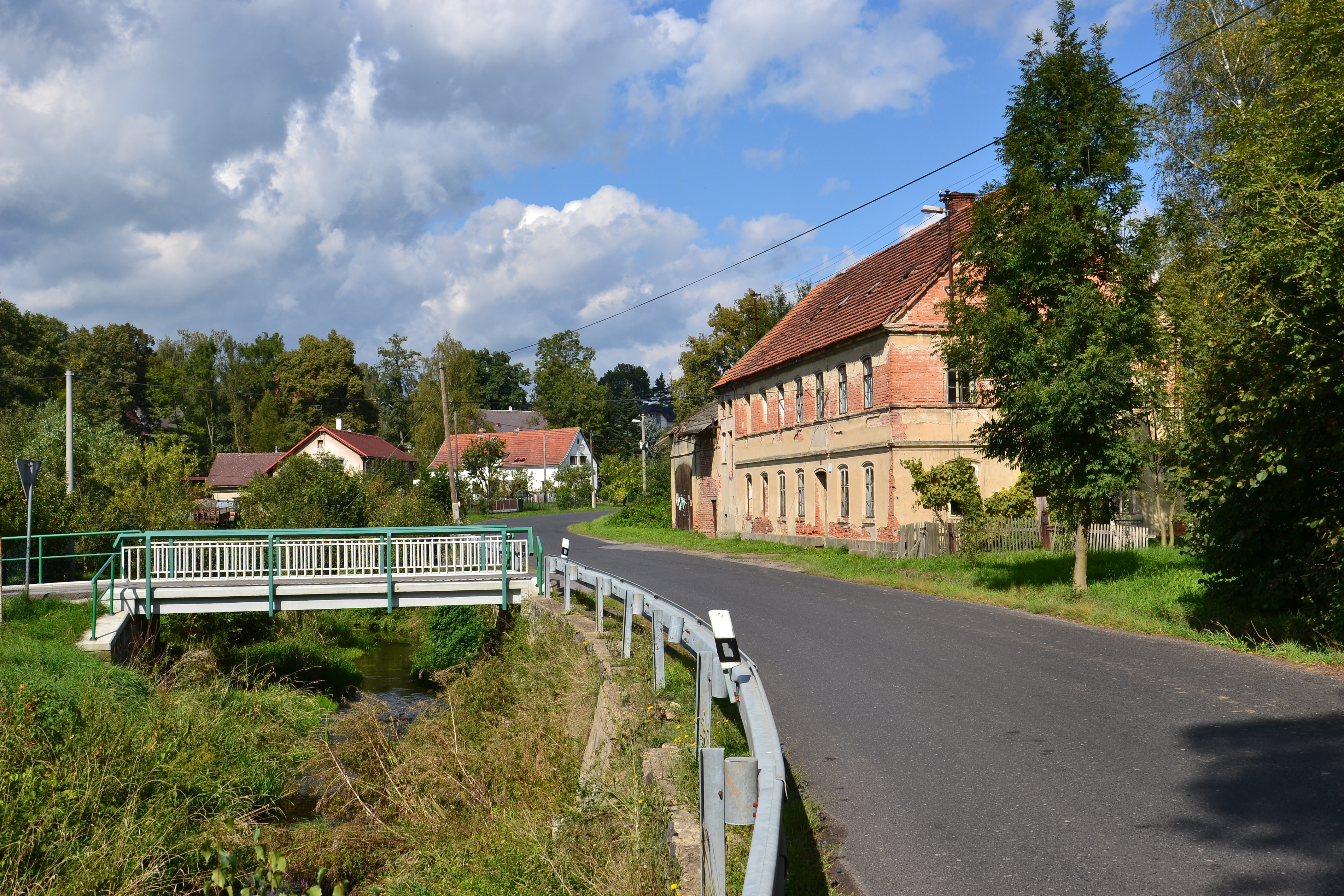 Severní část vesnice